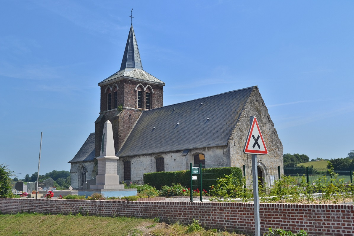 église de style Flamboyant en partie du 12 Em Siècle le chœur du 15 Em siècle une nef de 1779 une tour de 1879 et une cloche classée de 1506 appelée Marie